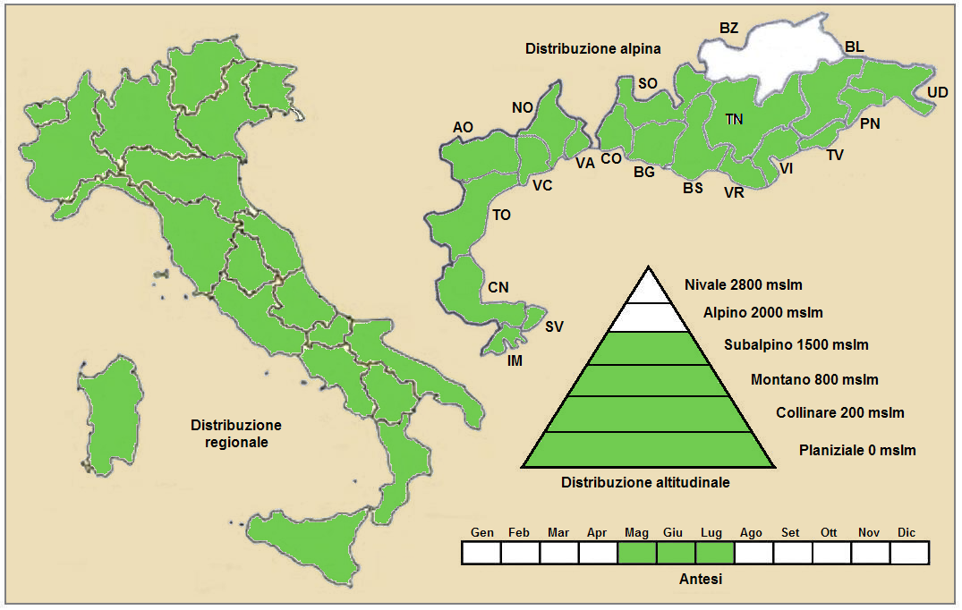 Thalictrum minus - Distribuzione